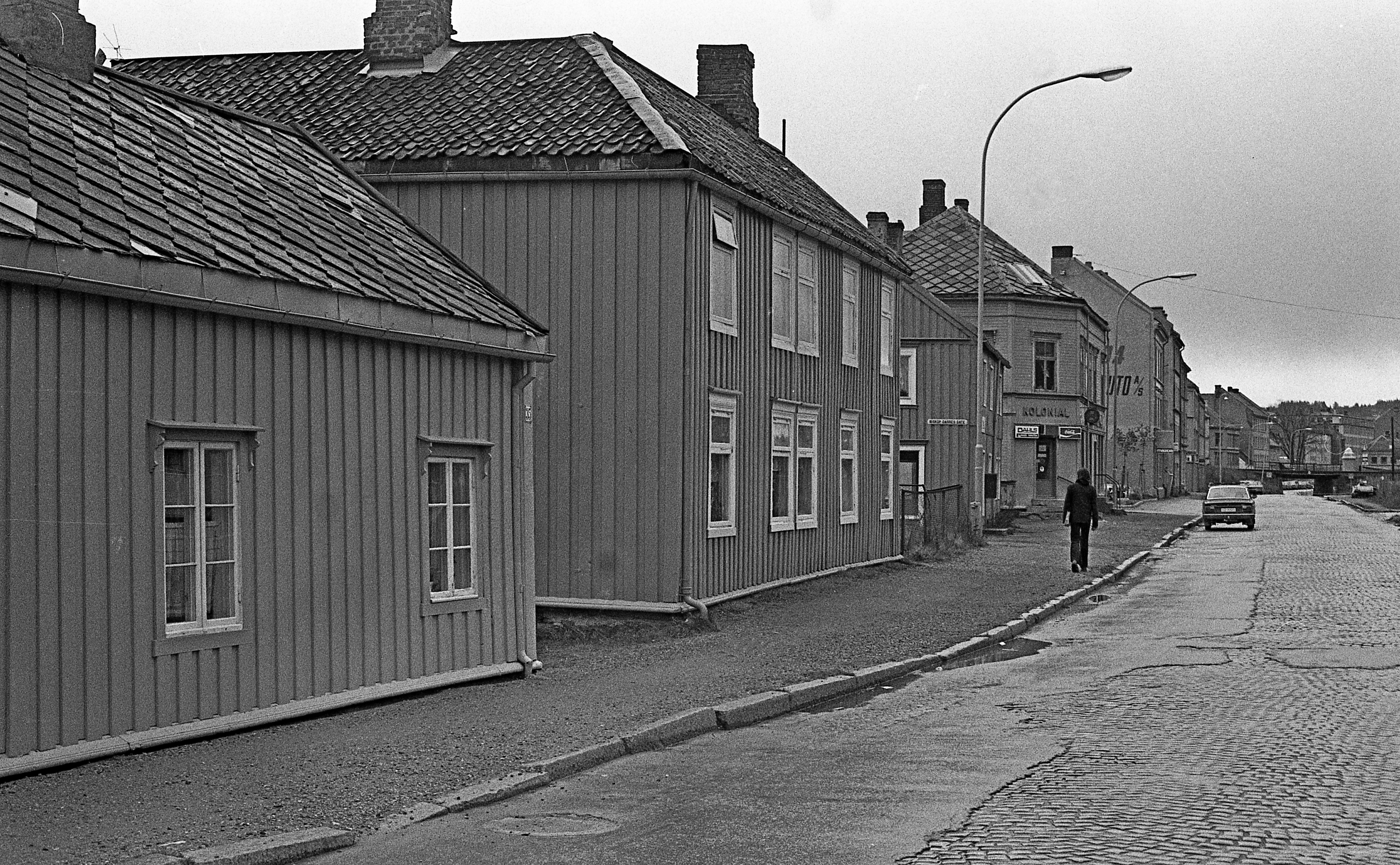 Format: sort/hvitt negativ Film: Kodak tri pan Safetyfilm Dato / Date: Oktober 1978 Fotograf / Photographer: Kjell Andresen Sted / Place: Strandveien, Trondheim Wikipedia: Svartlamon WikiStrinda: Strandveien Google Maps: bit.ly/10aMbQ5 Flyfoto 1937: bit.ly/15pbxOS Eier / Owner Institution: Trondheim byarkiv, The Municipal Archives of Trondheim Arkivreferanse / Archive reference: Tor.H43.P3.F10769, film 181 Merknad: Fra Byantikvarens negativsamling. Strandveien starter ved Innherredsveien og går til Ladehammerveien. Deler av veien var tidligere preget av slumbebyggelse og det meste av denne bebyggelsen ble revet under andre verdenskrig, da tyskerne begynte utbyggingen av havneområdet.